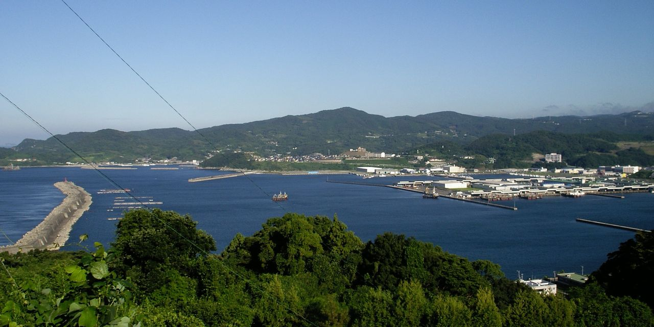 長崎市三重・畝刈地区。海岸沿いは1970年代頃から住宅地や漁港の開発が相次いだ。